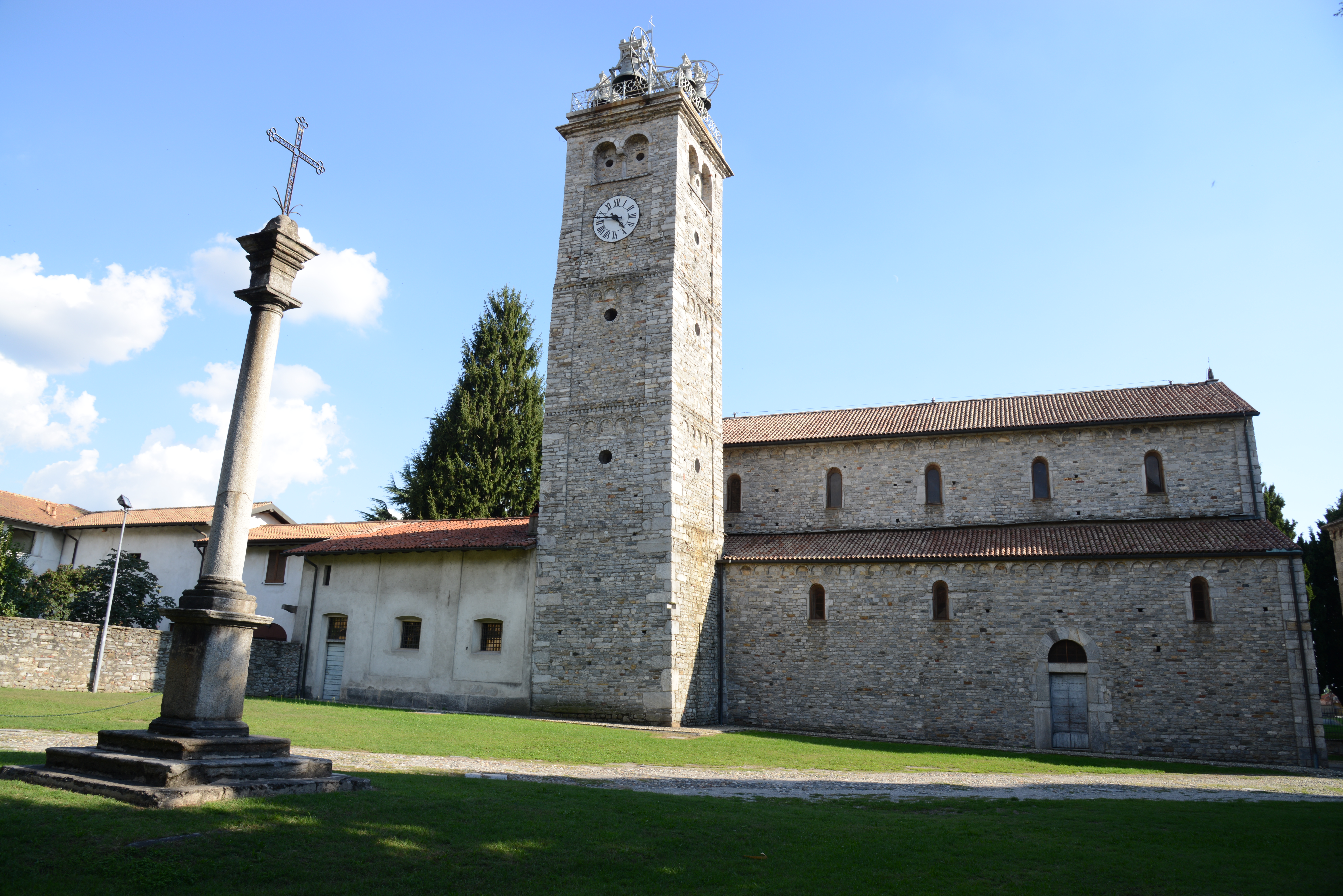 Basilica di San Vittore Martire This is a photo of a monument which is part of cultural heritage of Italy.